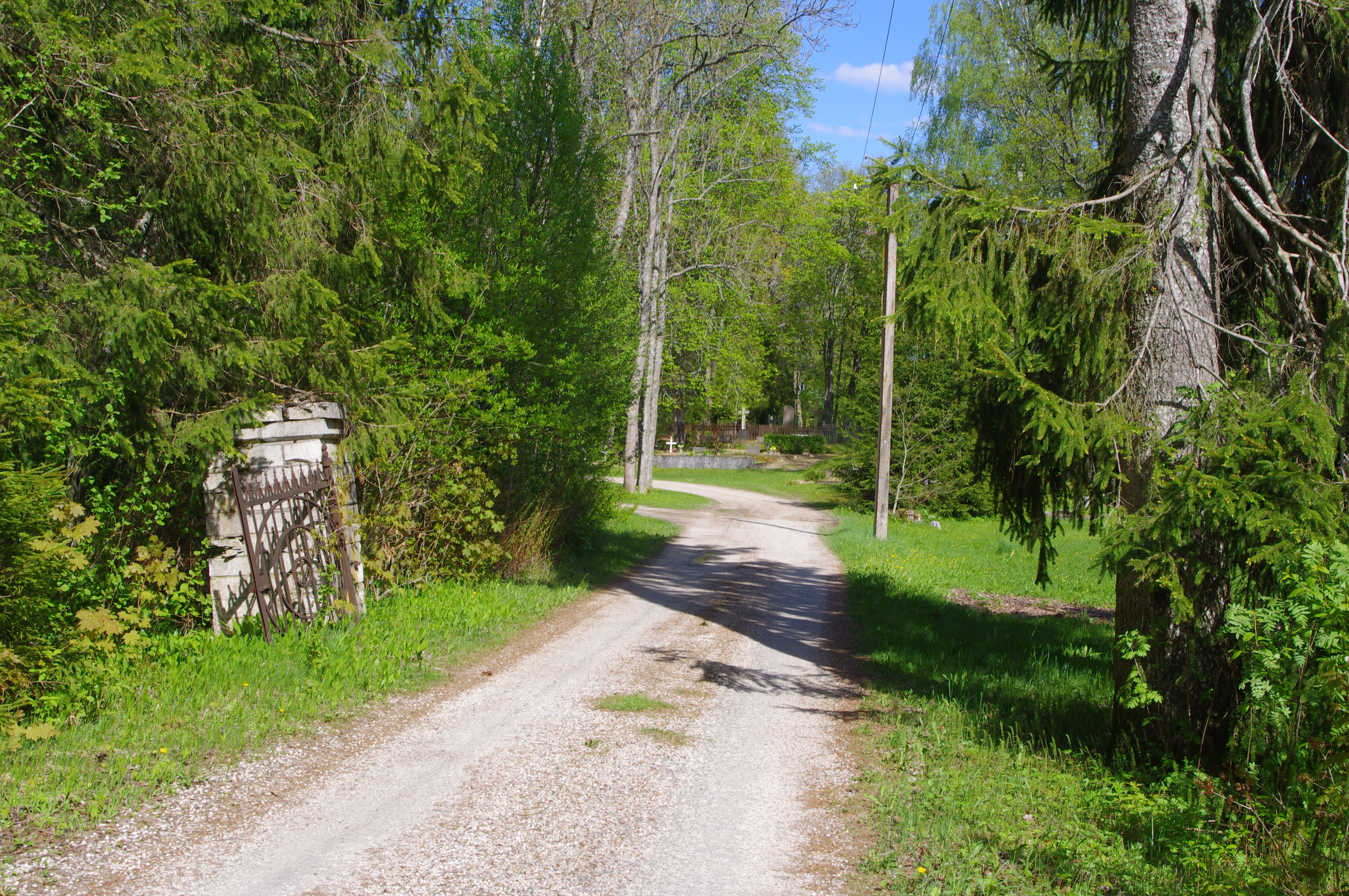 Käru kalmistu